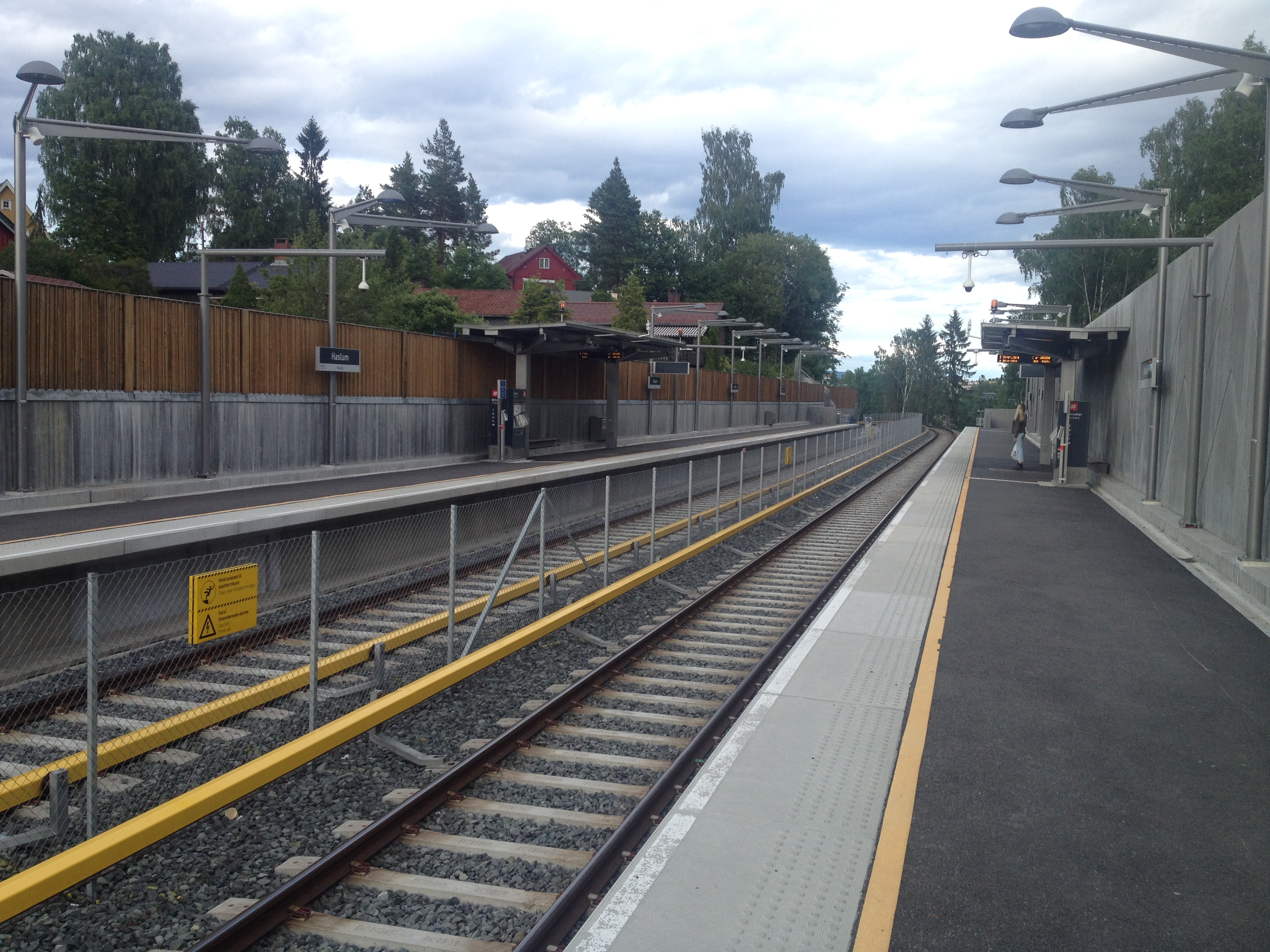 Haslum stasjon